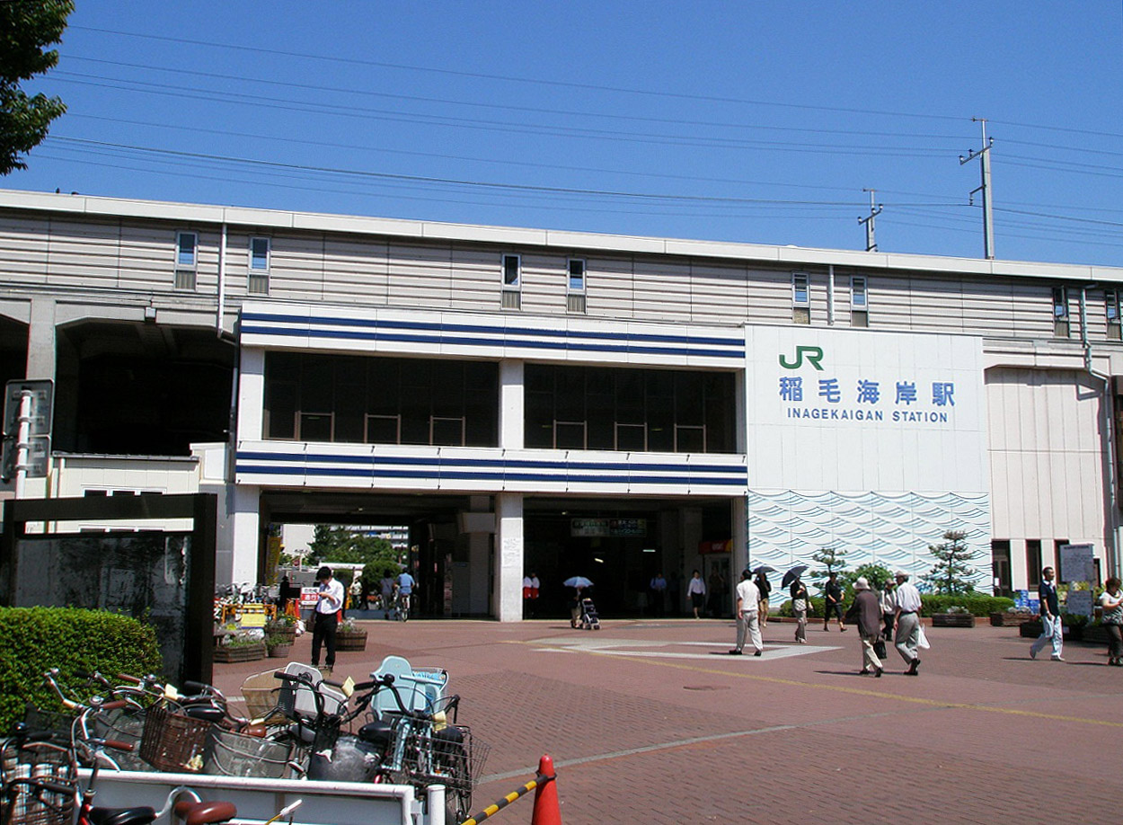 京葉線稲毛海岸駅南口から